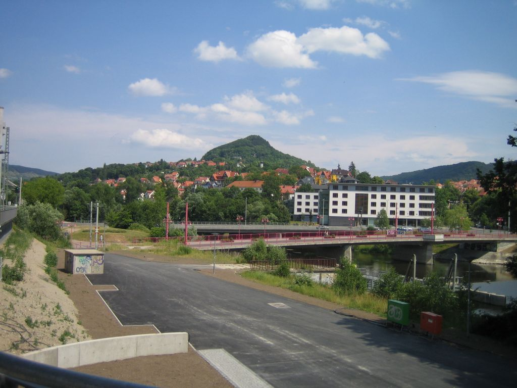 Jena, Blick auf einen der Berge